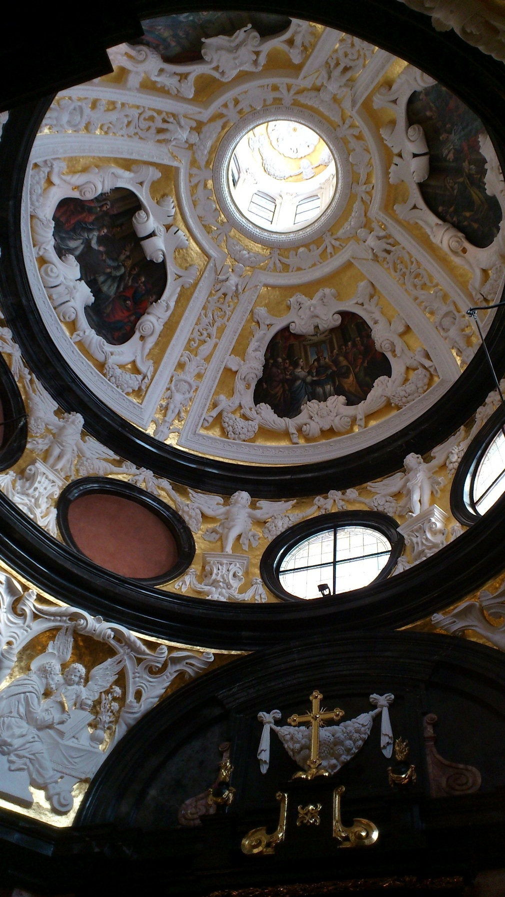 Katedra Wawelska - wnętrze kaplicy Wazów